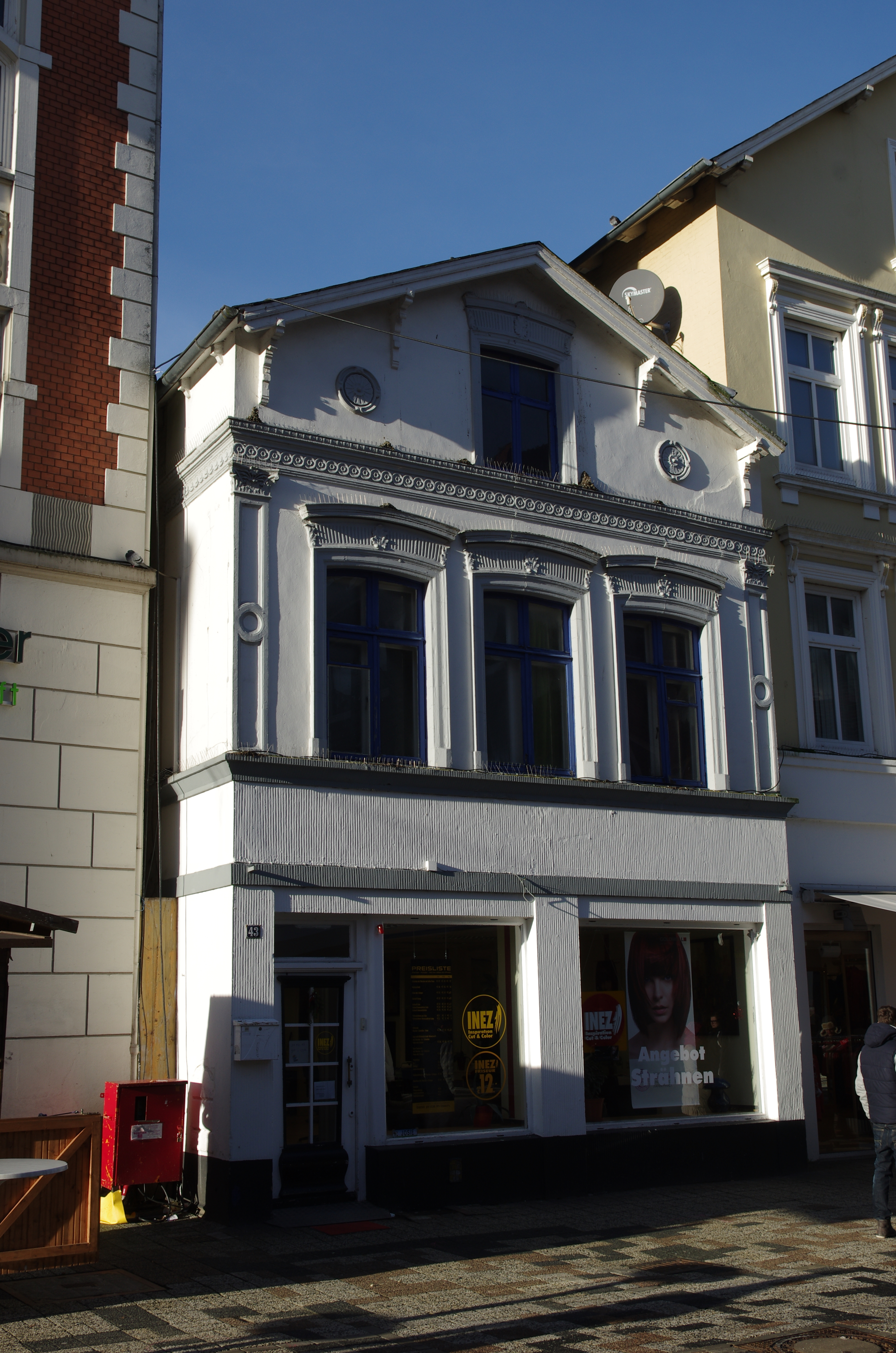 Cuxhaven in Niedersachsen. Das Haus Norderstraße 43 steht unter Denkmalschutz.